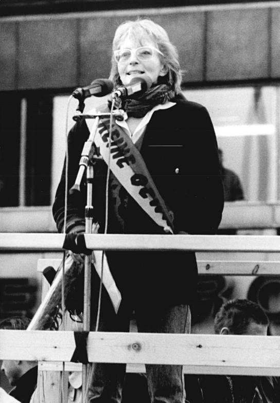 ADN-ZB Link 4.11.89 Berlin: Demonstration 500.000 Bürger beteiligten sich an einer Demonstration für den Inhalt der Artikel 27 und 28 der Verfassung der DDR. Auf dem anschließenden Meeting auf dem Alexanderplatz ergriff auch die Schauspielerin Marion van de Kamp das Wort.